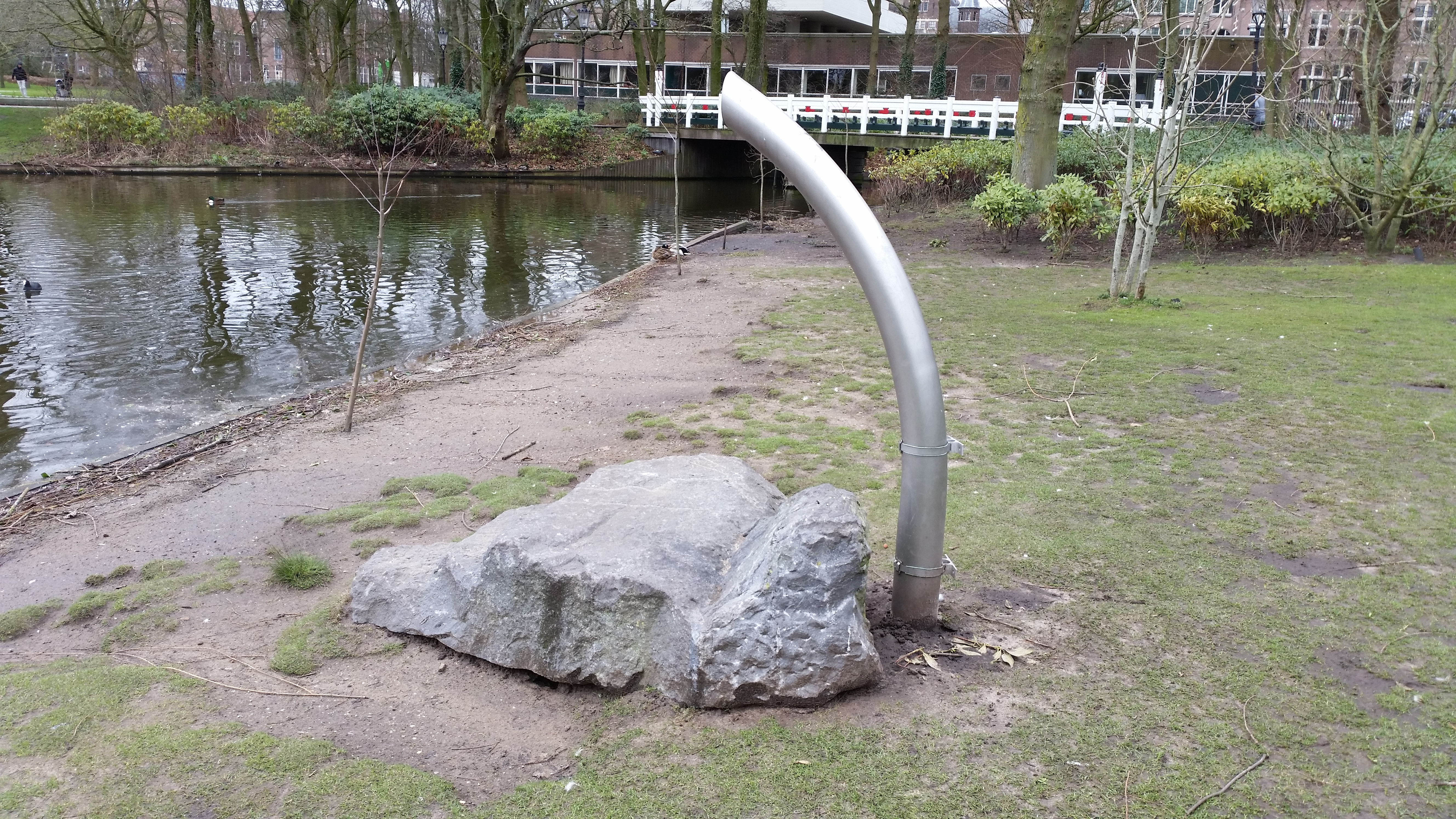 Spreeksteen in het Oosterpark, Amsterdam-Oost, februari 2020; op de achtergrond brug 159